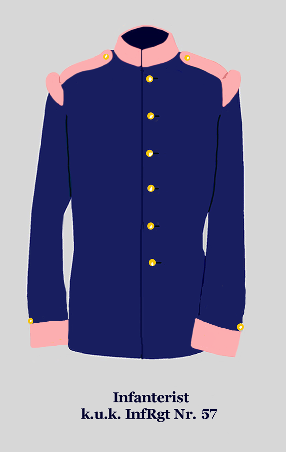 Waffenrock des k.u.k. Infanterie-Regiments Nr. 57“.